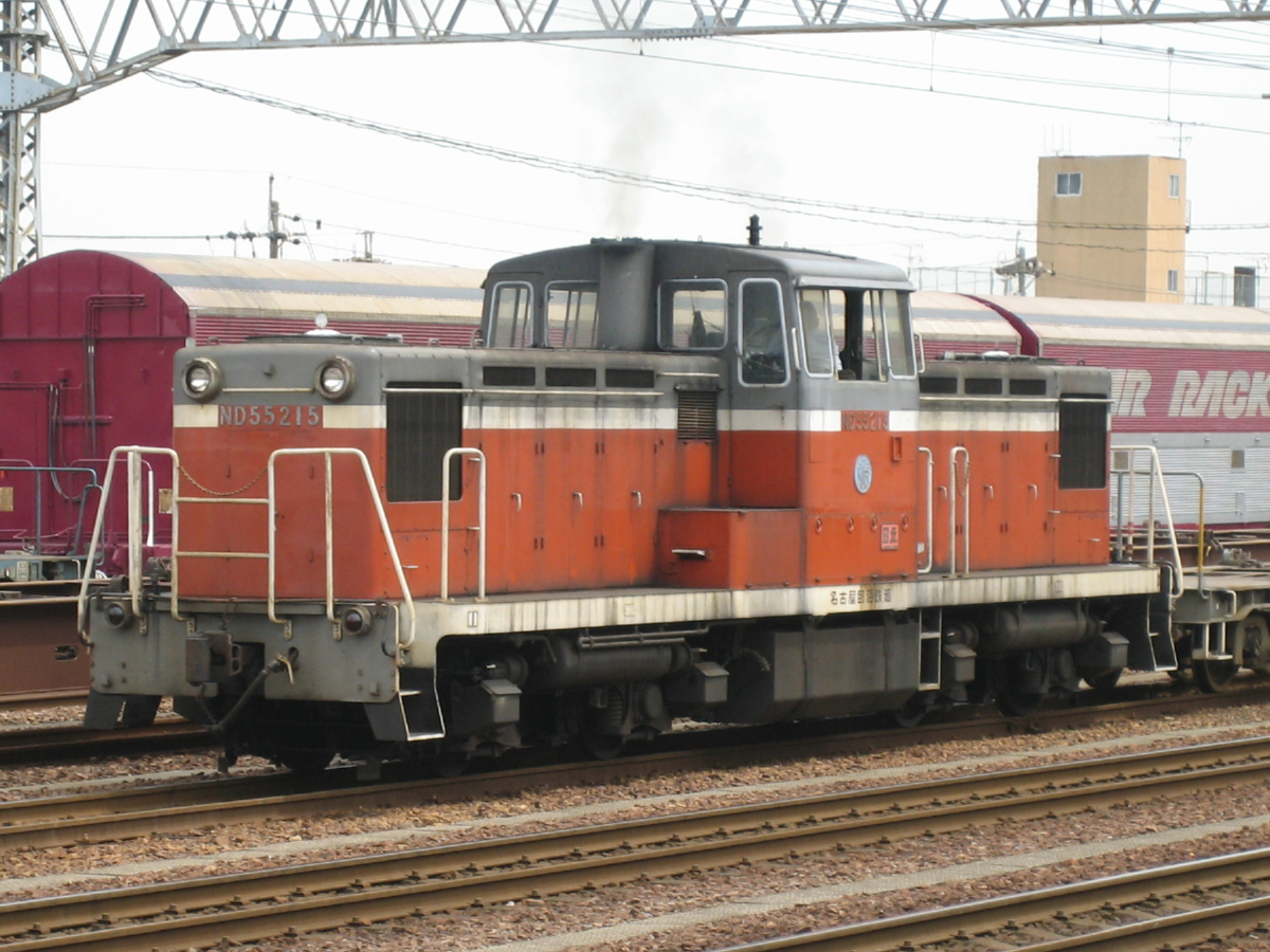 名古屋臨海鉄道 ND55形215号機（元国鉄DD13 306号機）、名古屋貨物ターミナル駅で入換作業中